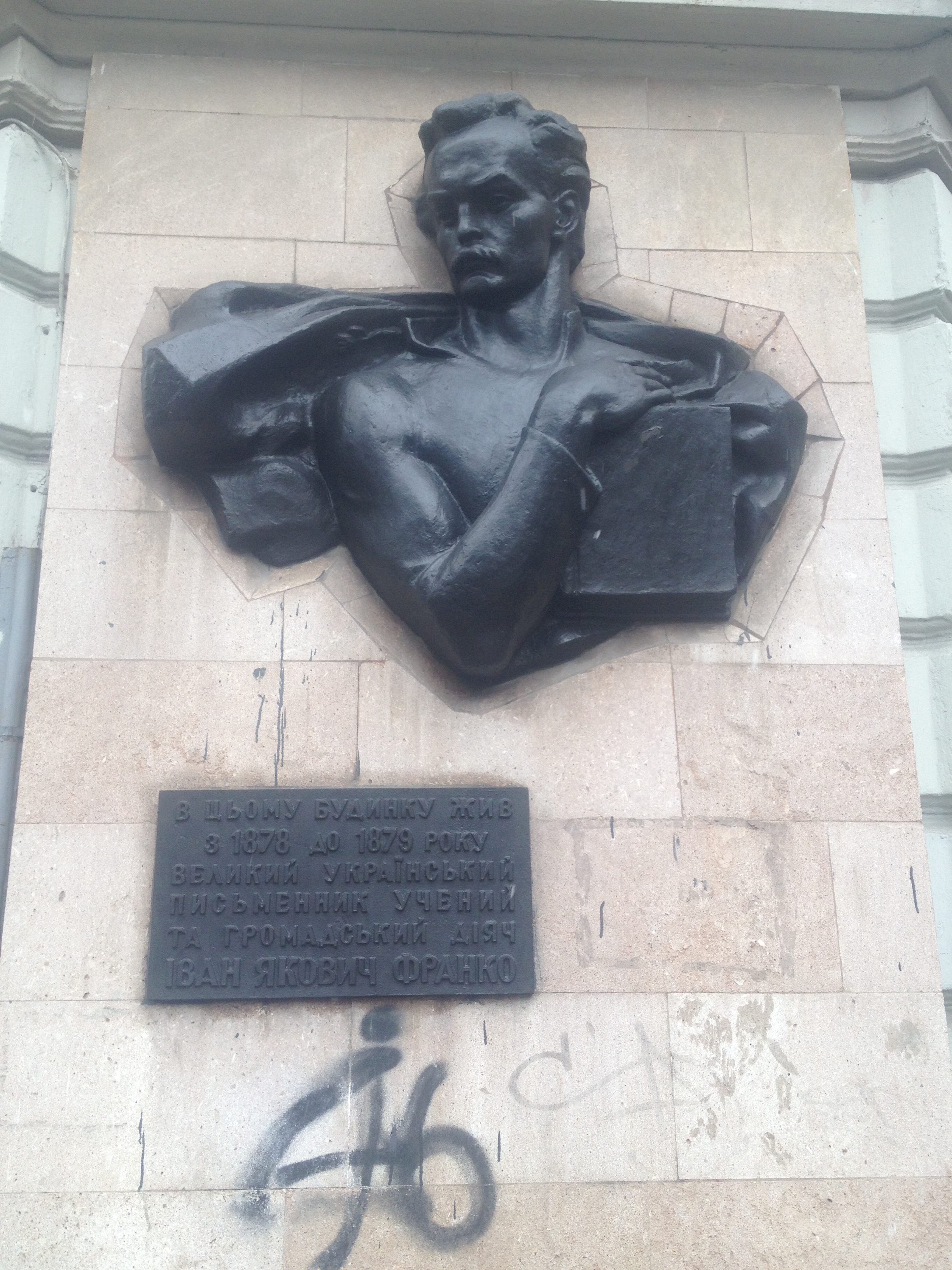 Меморіальна дошка